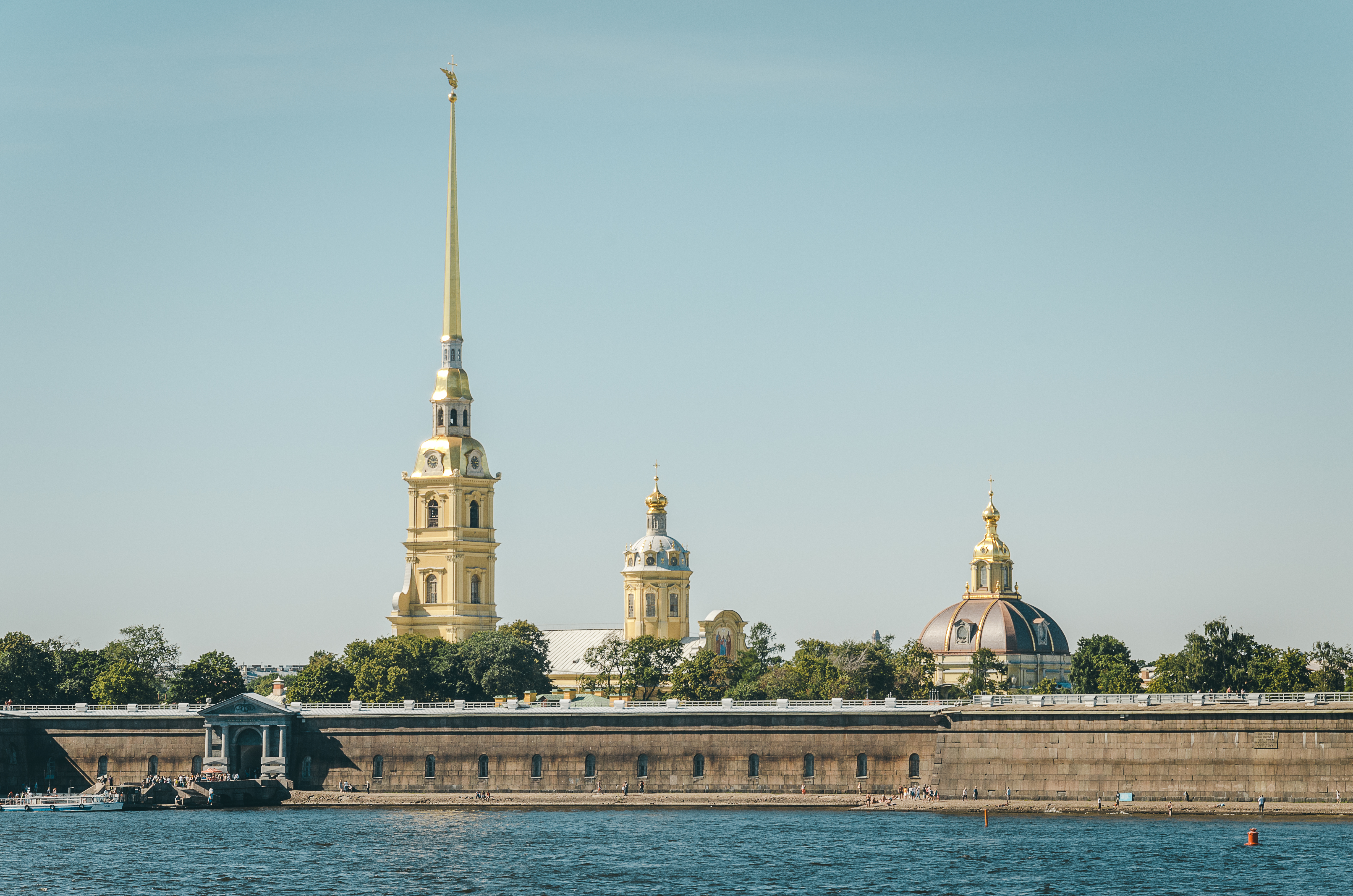 Петропавловская крепость: о. Заячий, Петропавловская крепость, Кронверкское, Петроградский район, Санкт-Петербург